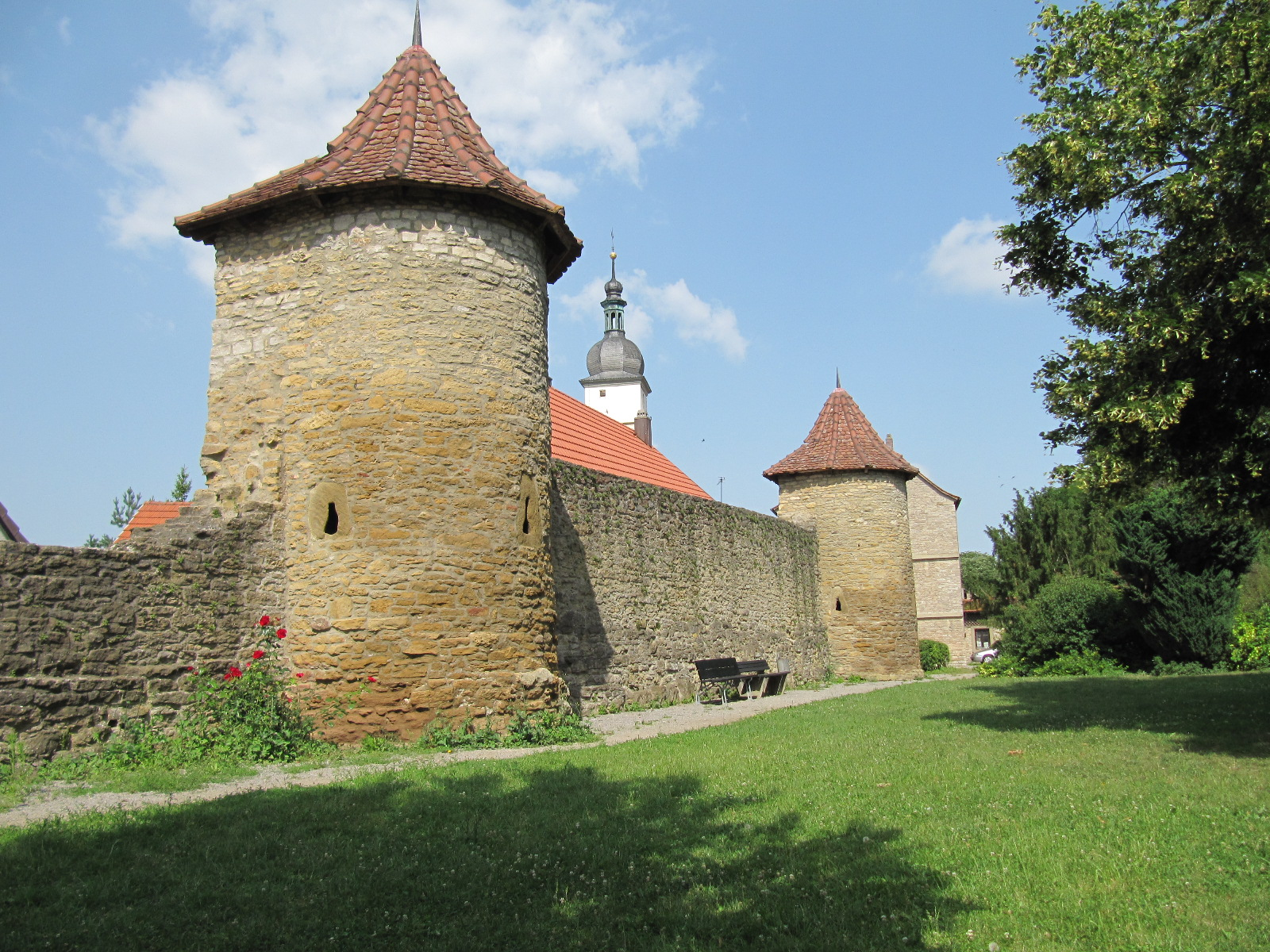 Stadtmauer am Turngarten im NO, entlang des Holzgrabens